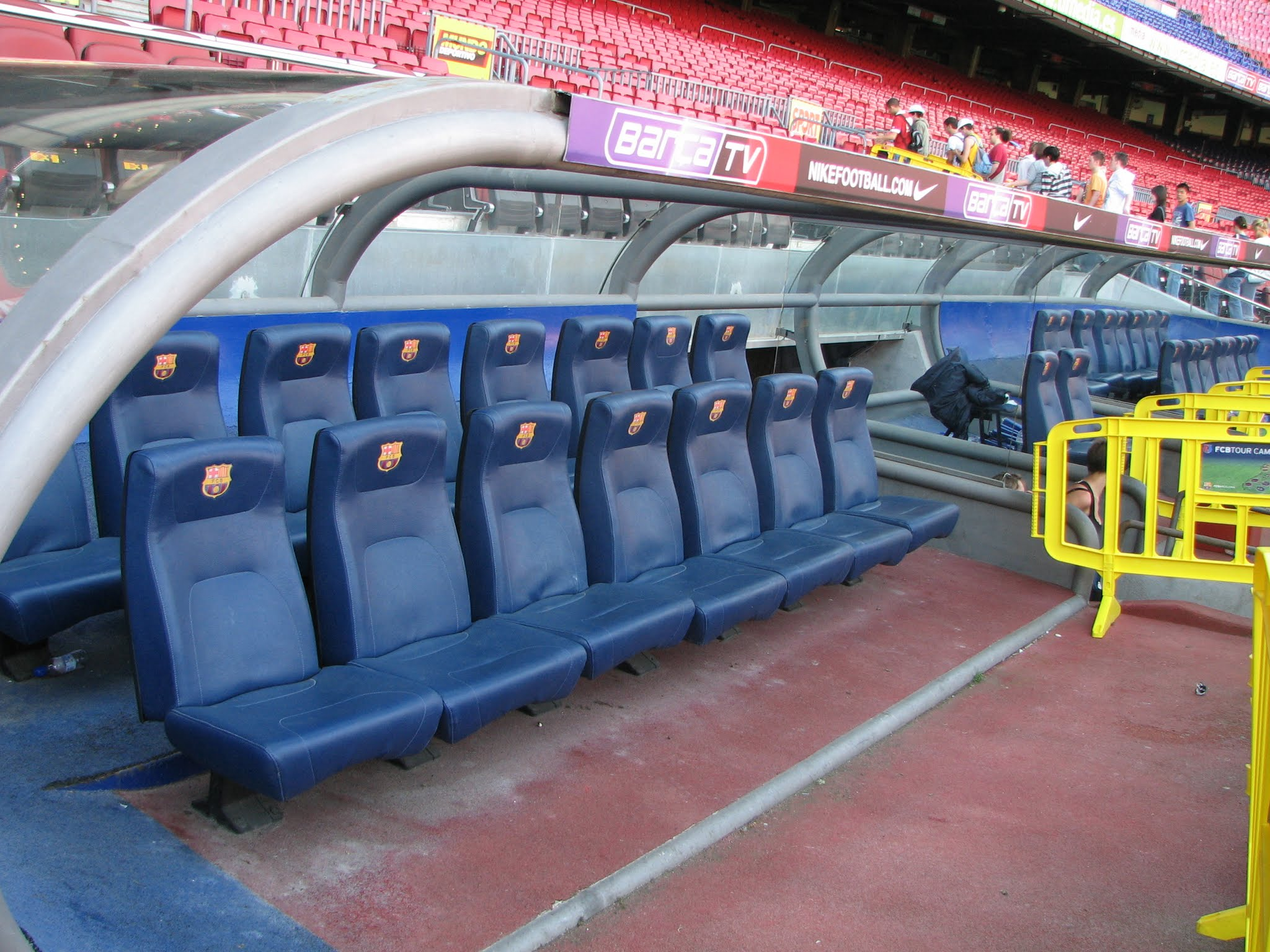 Barcelona